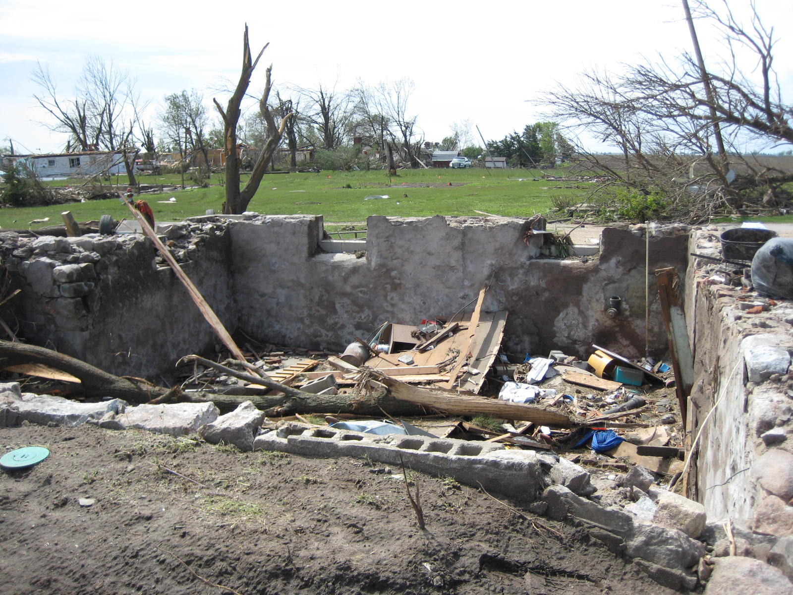 Tornado damage in Parkersburg, Iowa